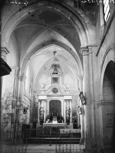 Choeur.